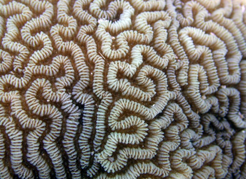 Leptoria phrygia, Samoa Americana